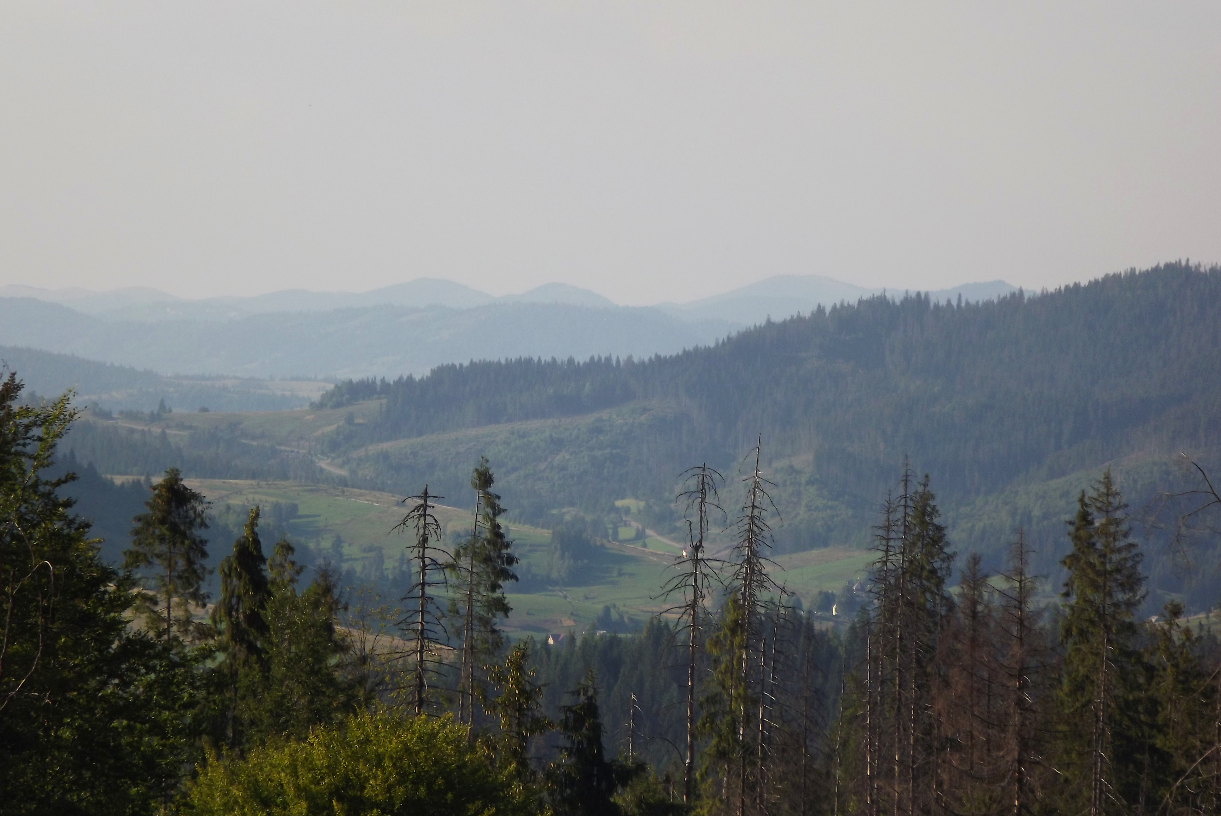 Вигляд на село Волосянка (Сколівський район, Львівська область), серпень 2015 року